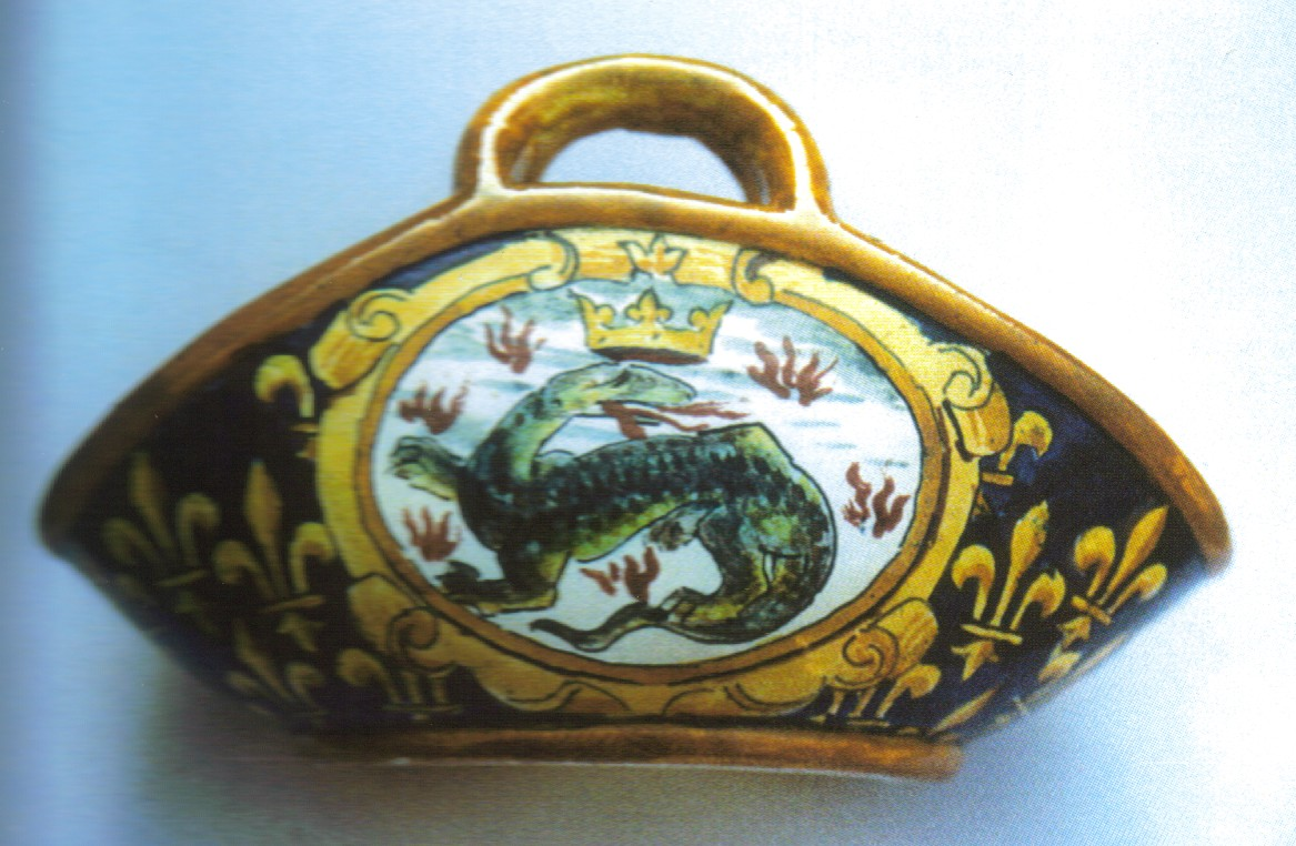 adrien thibault panier